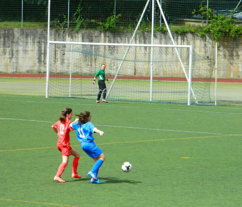 Nesken ekipo bar partiduan.